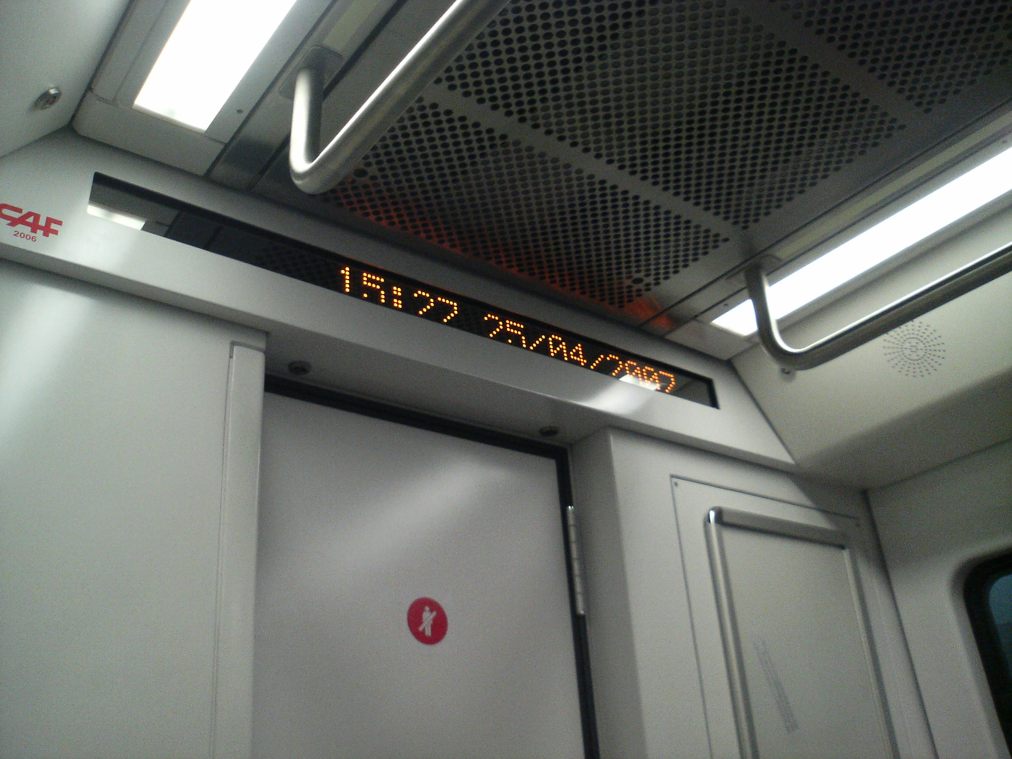 Dicen que el metro tarda 13 minutos en hacer todo el recorrido, como se puede ver salimos de la UIB a las 15:27...Metro saliendo de la UIB